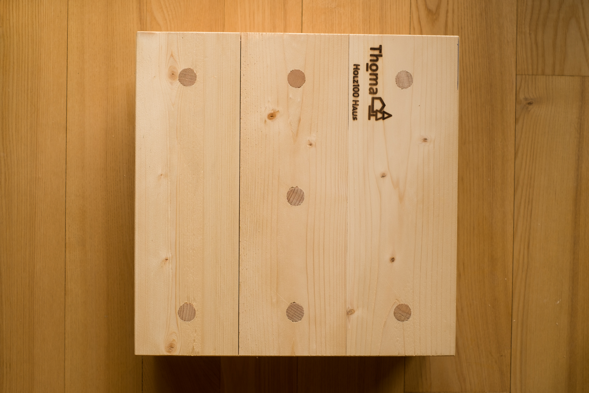 Holz100 Dübelseite